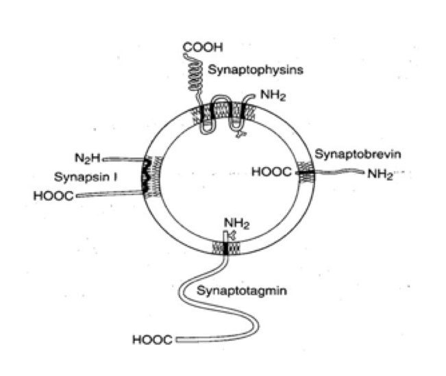 zahlreiche Membranproteine umgeben den synaptischen Vesikel